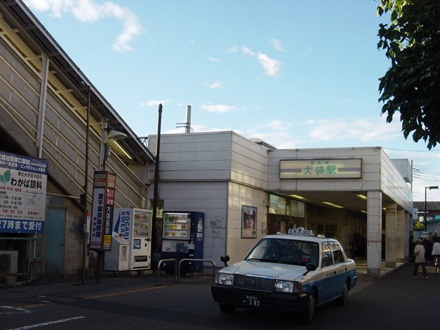 大袋駅（2006年10月7日 投稿者が撮影）